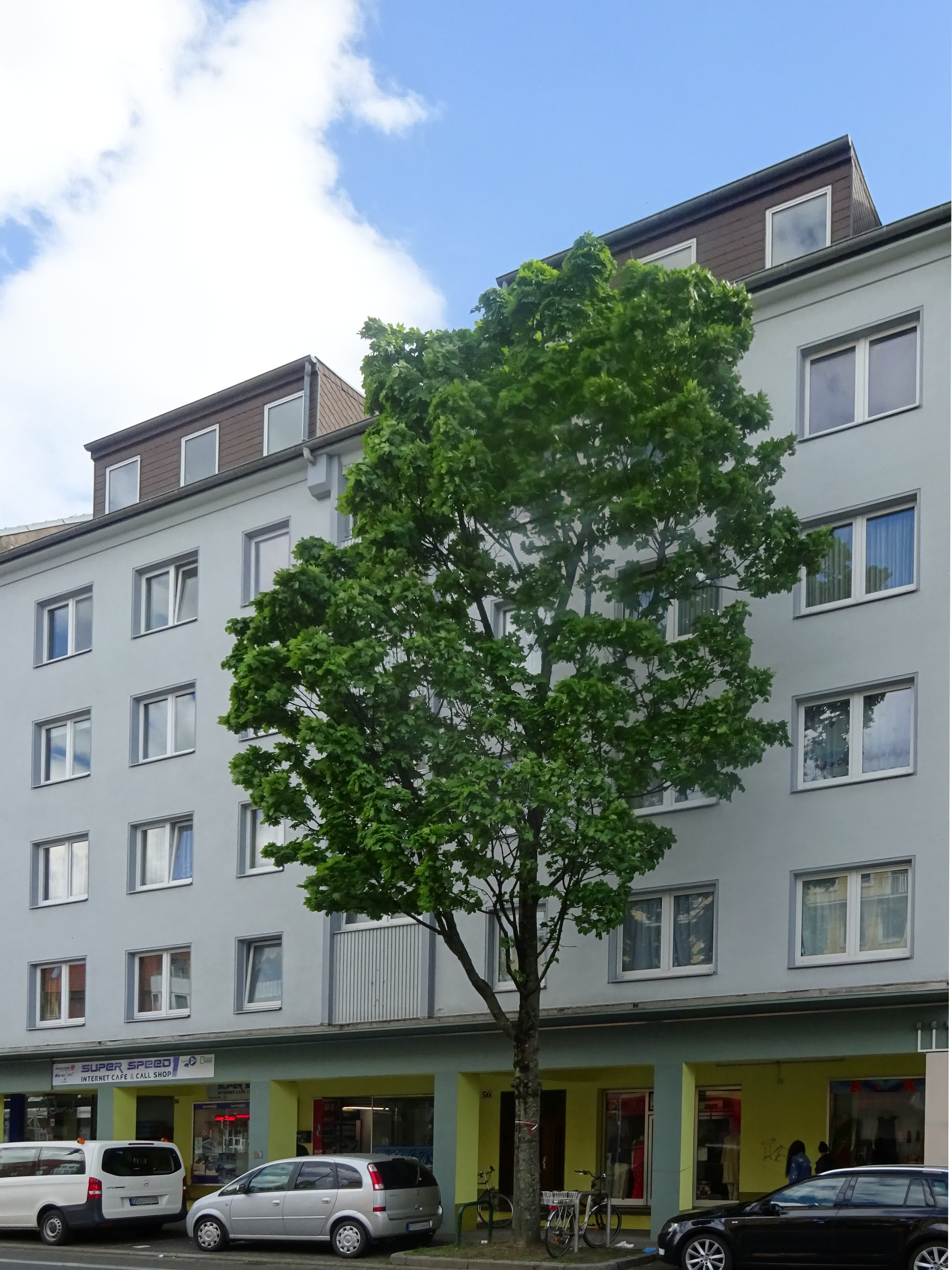 Wohnhaus Rheinische Str. 56 in Dortmund